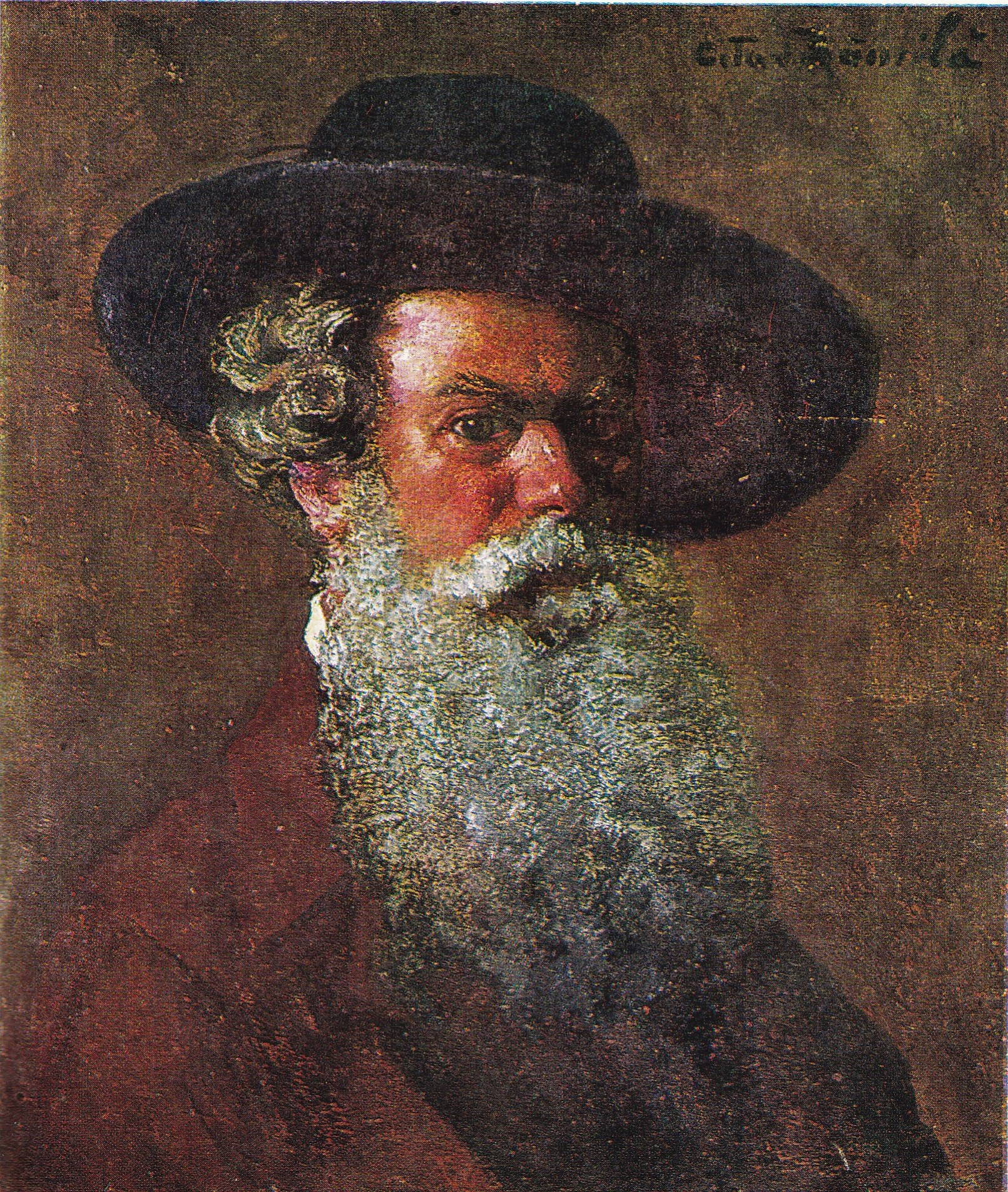 Autoportret realizat de Octav Băncilă până în anul 1900